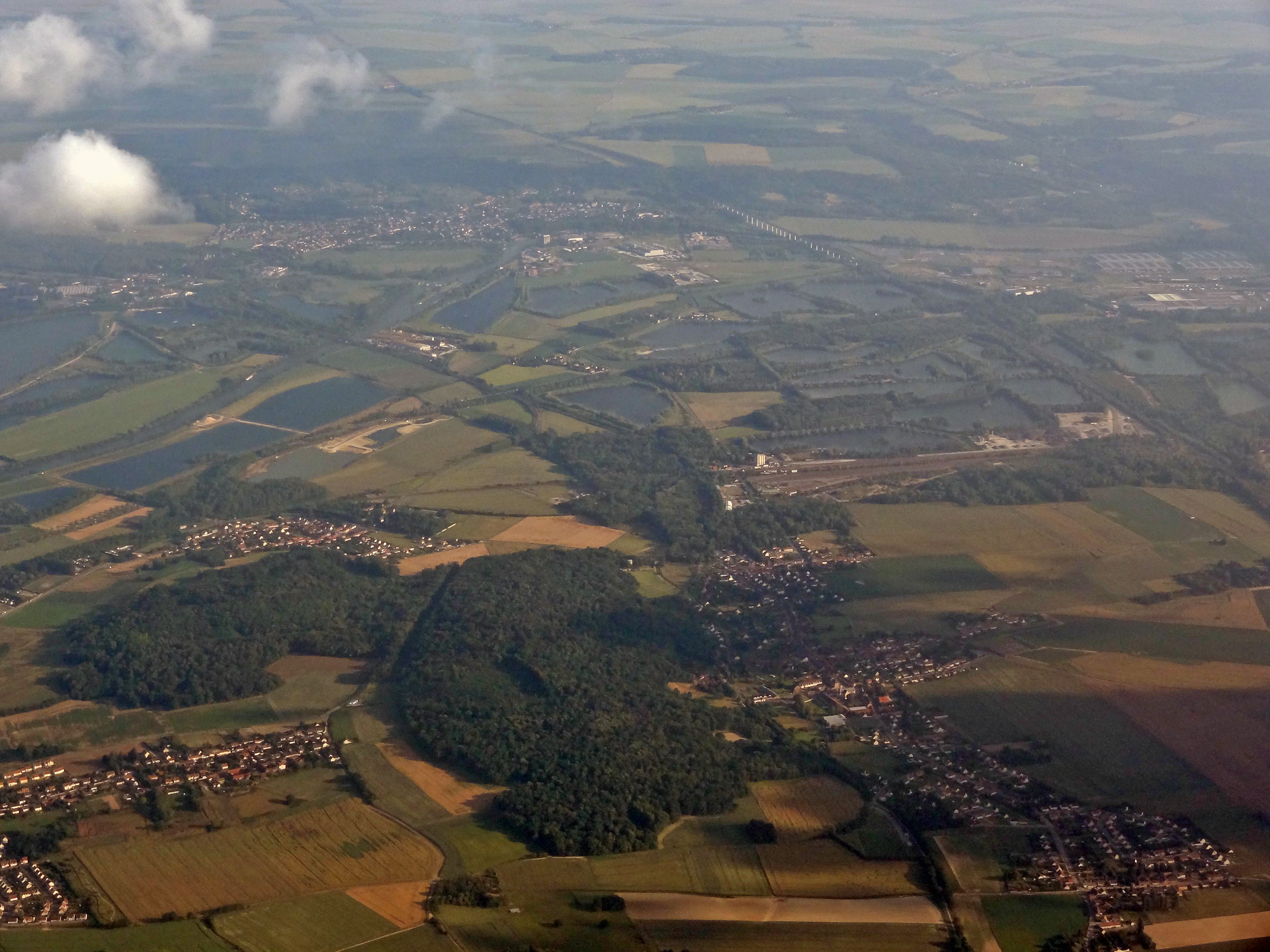 Vue aérienne de Longueil-Sainte-Marie et Rivecourt et de la LGV Nord (Oise), France. Vue en direction du sud.